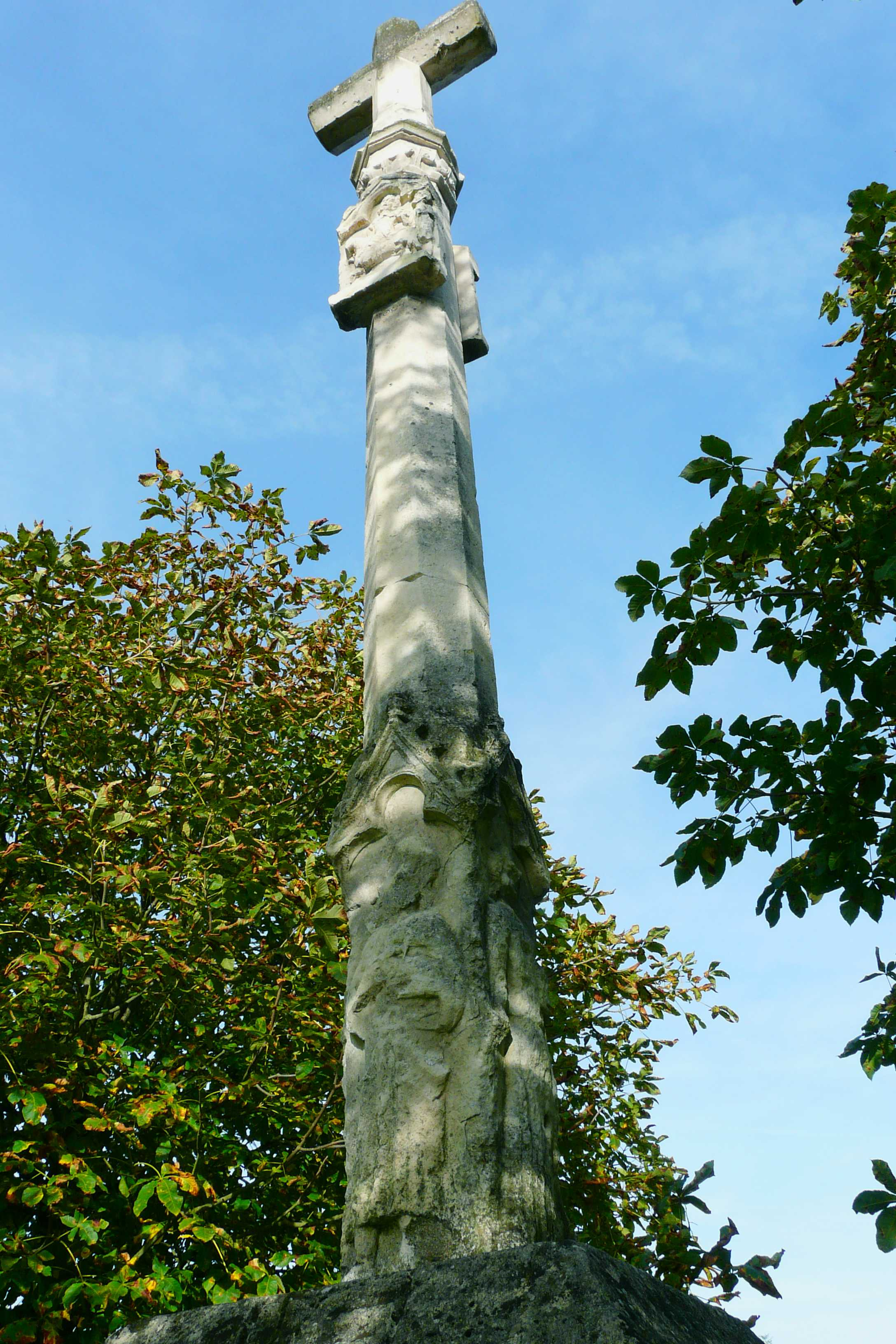 Croix en pierre de Jaulges (Inscrit)